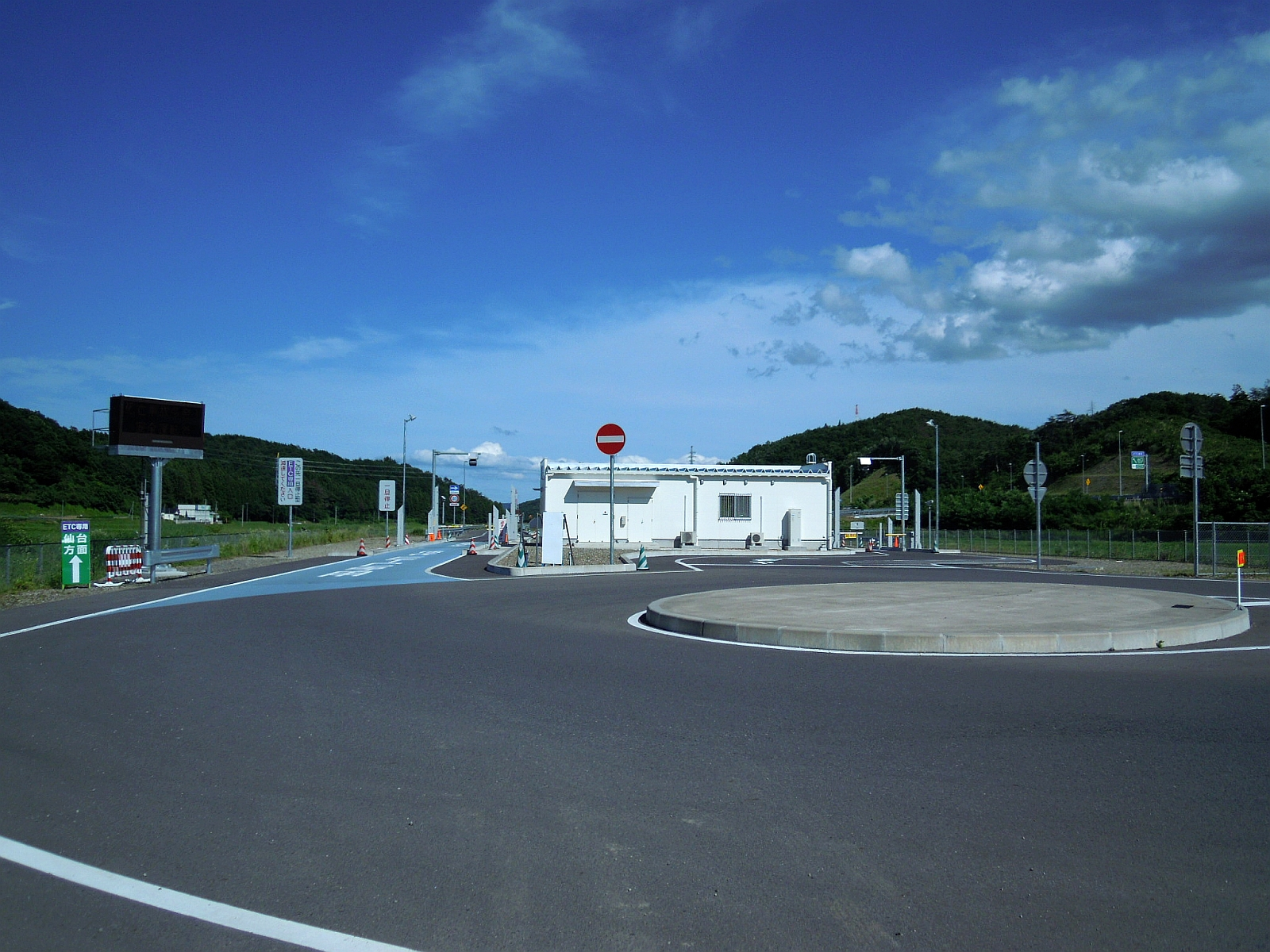 福島県白河市にある東北自動車道白河中央スマートインターチェンジ料金所を一般道側から。